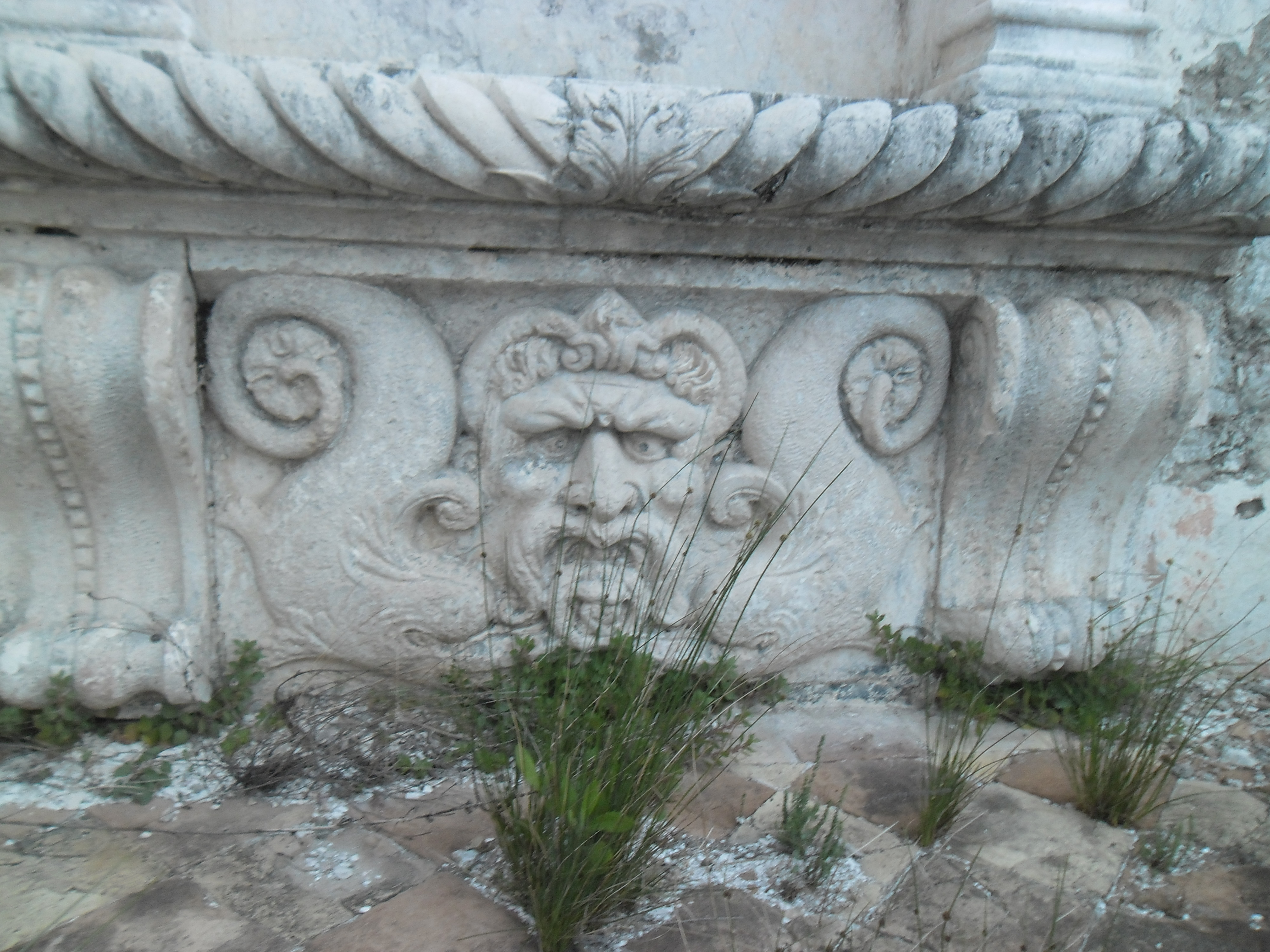 ures ljetnikovca u Rožatu u Rijeci dubrovačkoj